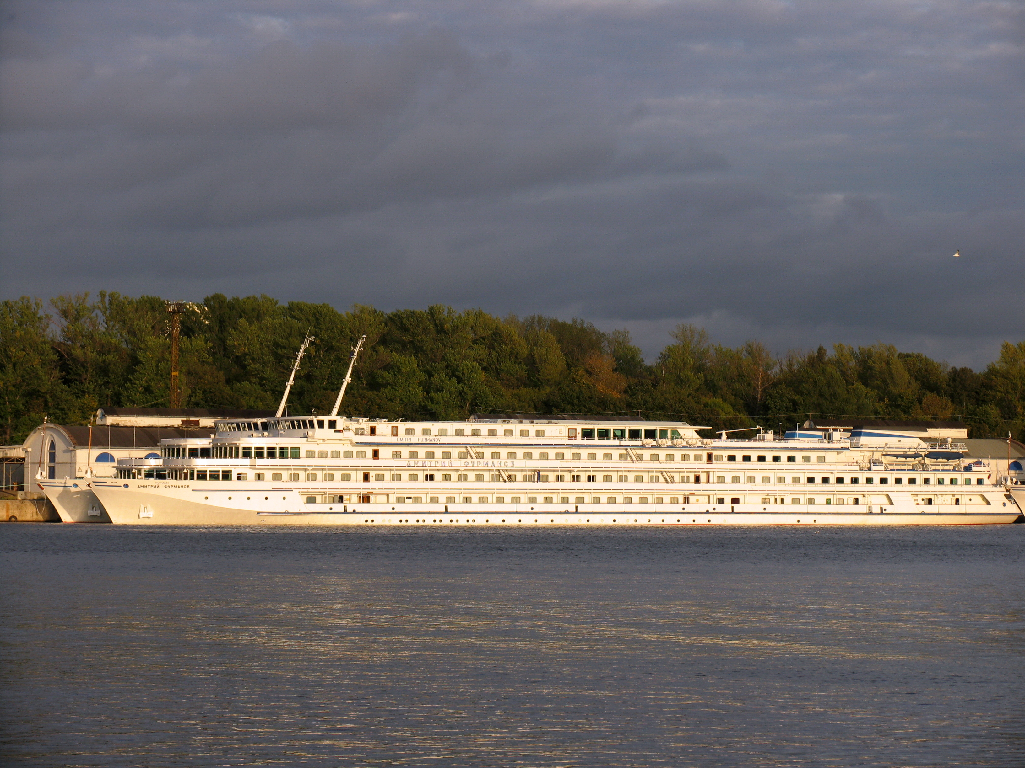 Речное круизное судно "Дмитрий Фурманов" в Северном речном порту. Москва.